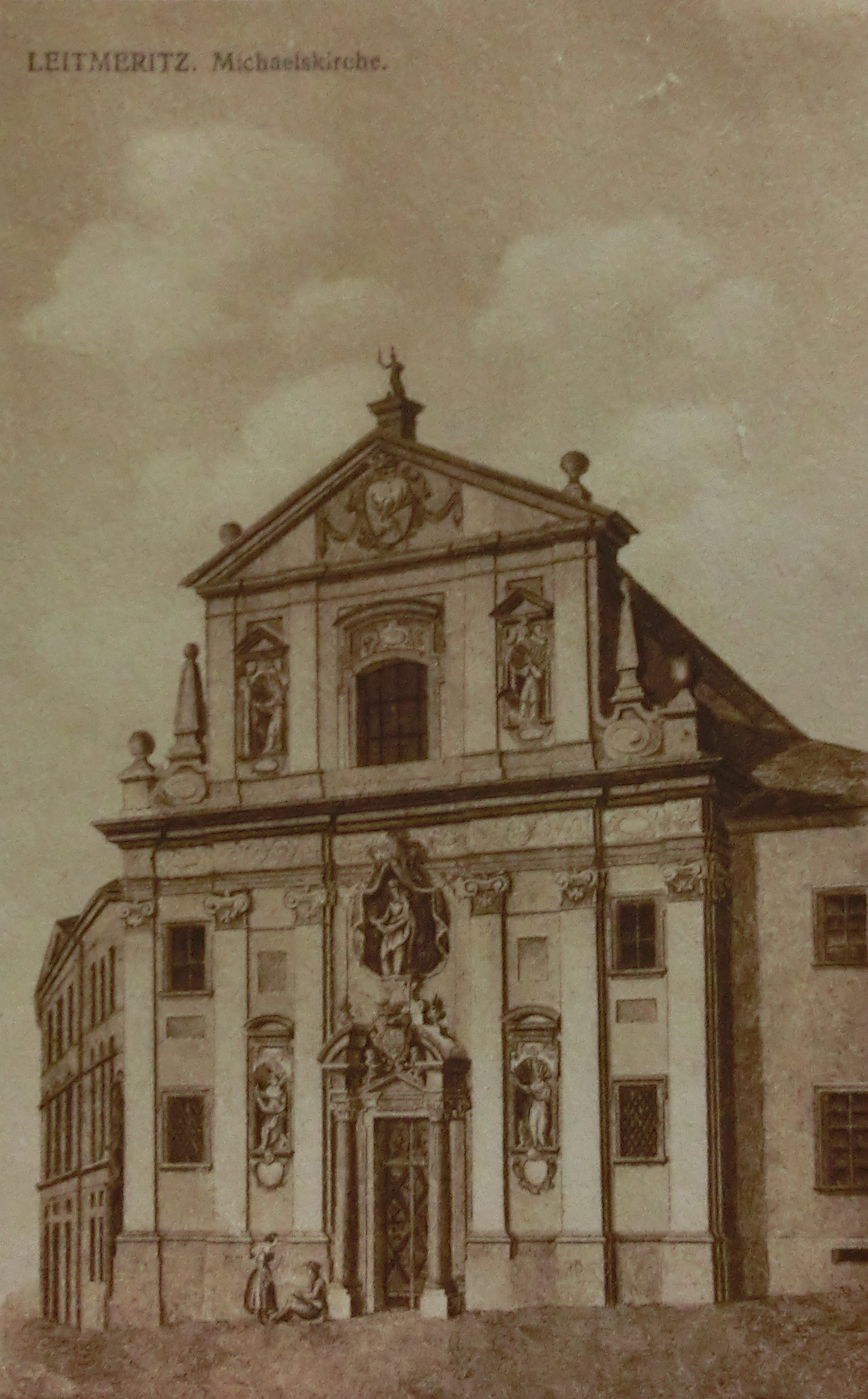 Kostel sv. Michaela, Michalská ulice, Litoměřice; postaven v letech 1672-1685, sloužil jako řádový dominikánský kostel do roku 1788, zbořen roku 1838